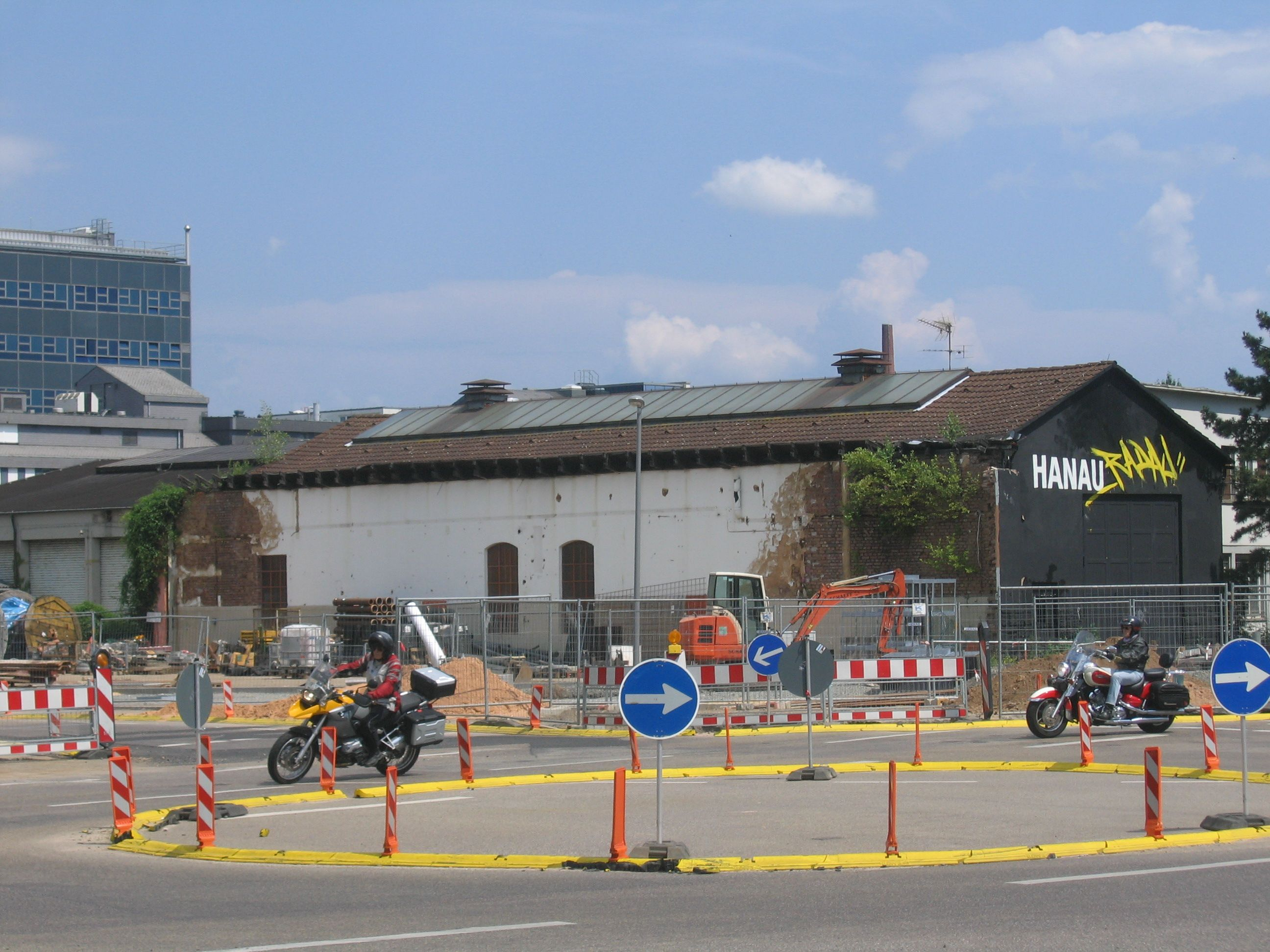 Die Hallen des ehemaligen Straßenbahndepots 1 (Hanau) vor dem kompletten Abriss. Im Vordergrund der Kurt-Blaum-Platz während des Umbaues zum Kreisverkehr. Links im Hintergrund ein Gebäude der Fa. Heraeus.